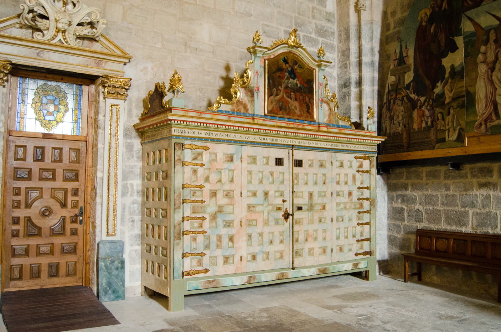 Armario de la cofradía de Las Ánimas. Iglesia de San Nicolás de Bari, Burgos (España)